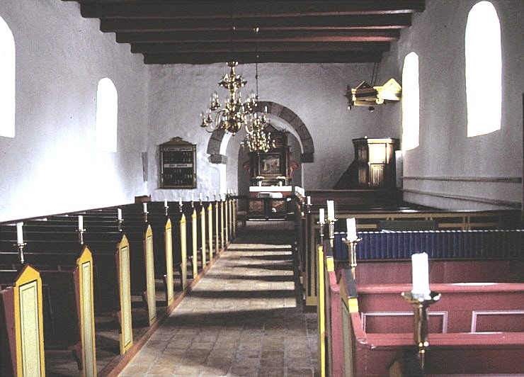 Tulstrup Kirke, Skanderborg Kommune - Kirkerummet set mod øst